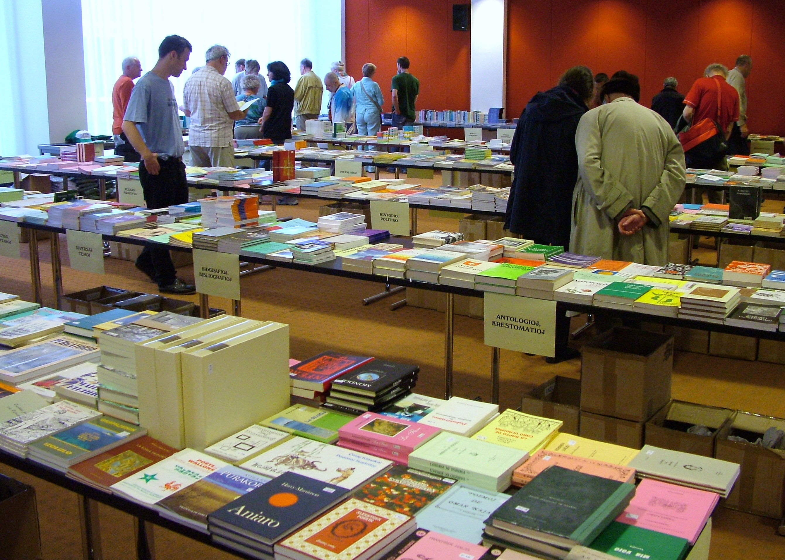 Universala Kongreso de Esperanto, Roterdamo 2008. Libroservo.